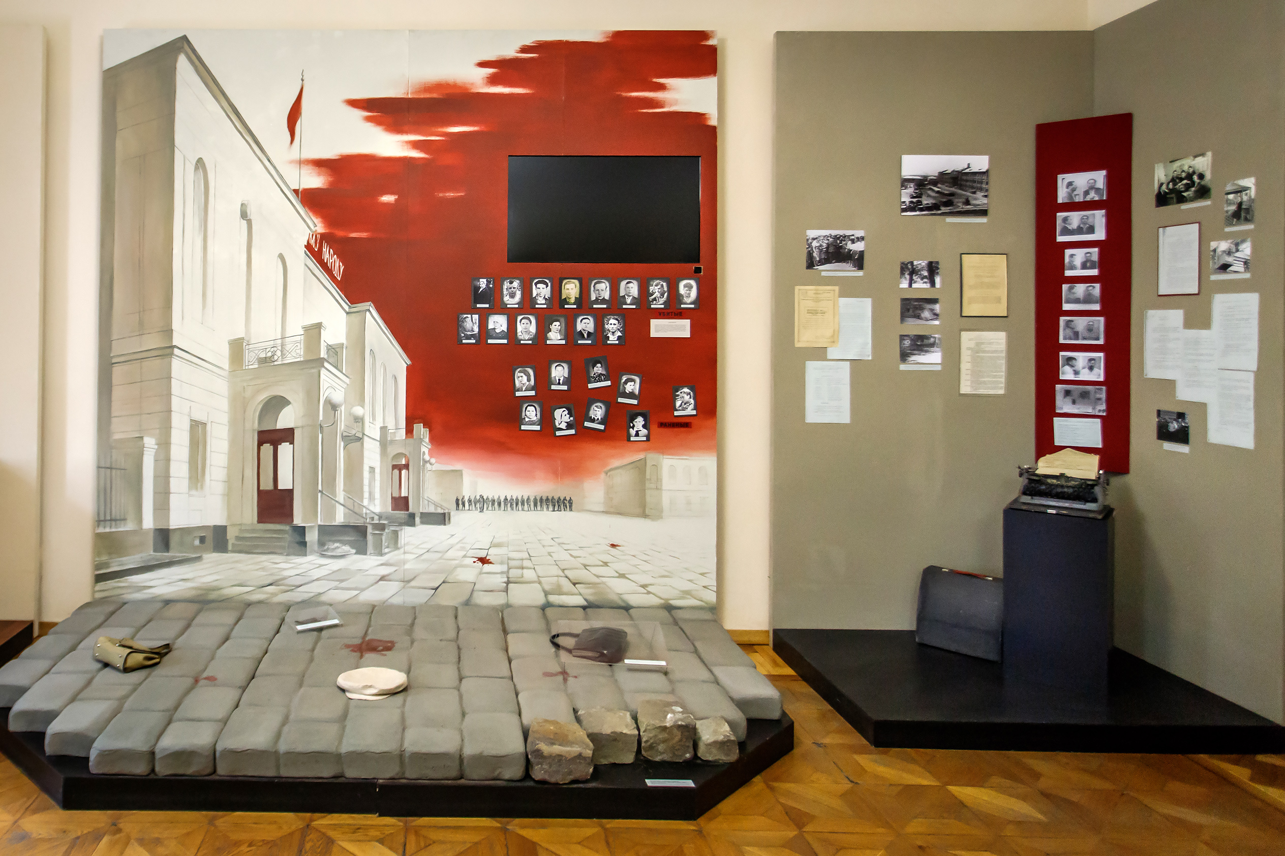 Экспозиция о трагических событиях 1962 года.